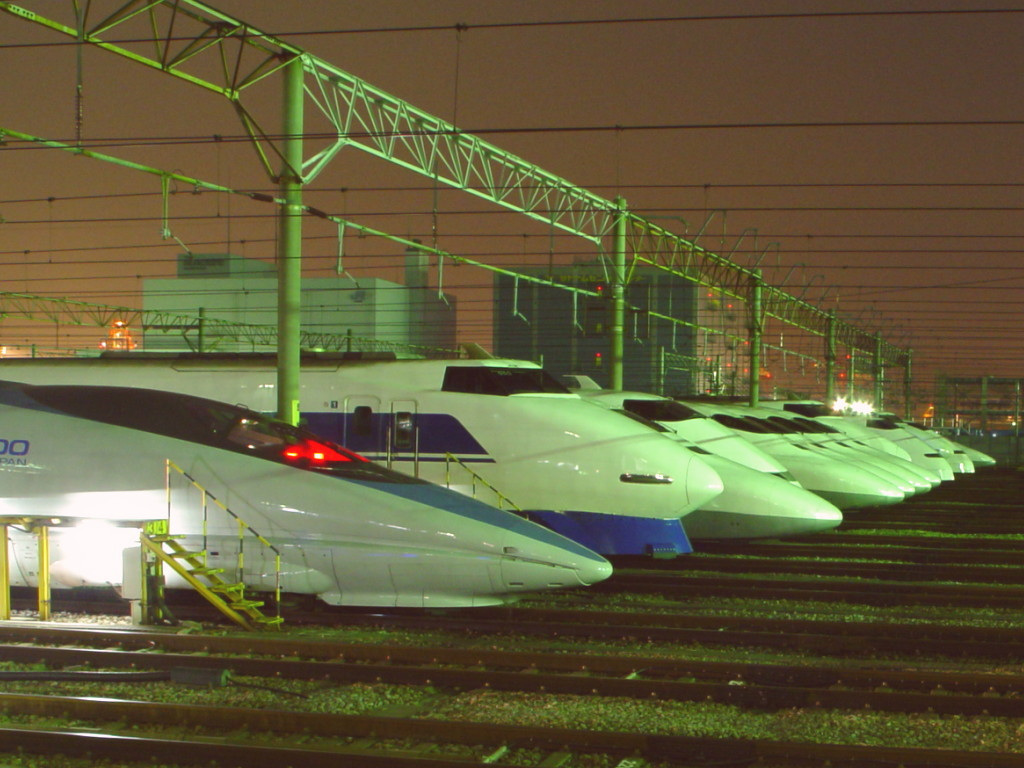 Shinkansen Abbildung mehrerer Züge Quelle: [1] public domain Größe: 200,3 KB